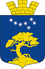 герб посёлка Пяозерский, Карелия, Россия